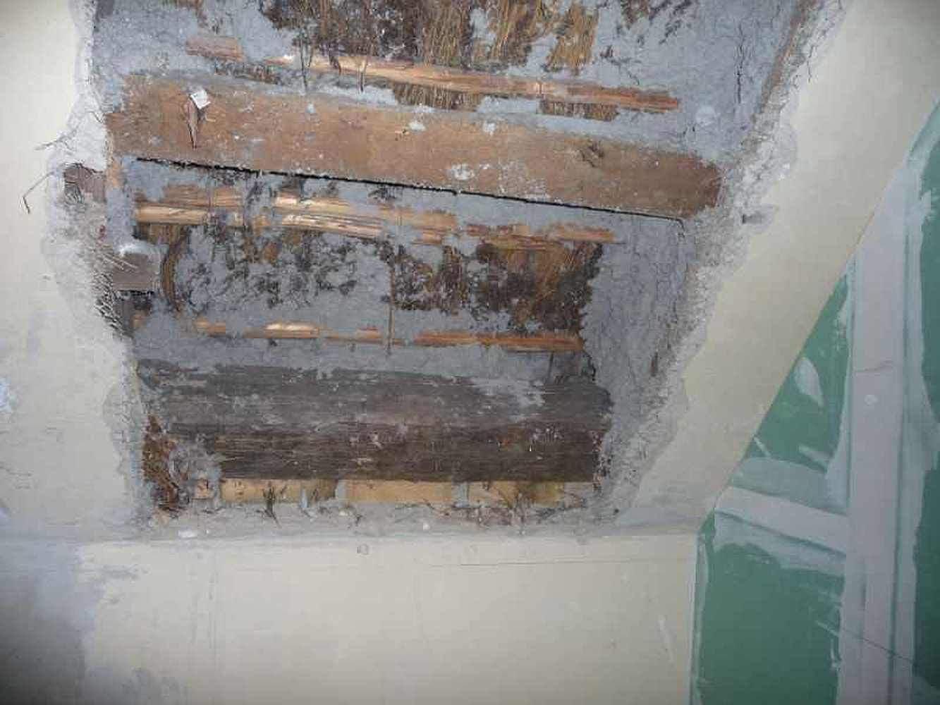 Beflocktes Reetdach bei einem späteren Dachfenstereinbau. Die Zellulose schmiegt sich an die Halme und erlaubt keine unkontrollierten Luftströmungen. Sie wirkt außerdem als "Löschblatt" für jede Feuchtigkeit, die sich für eine logische Sekunde an den Halmen bilden mag. Das Material im übrigen Sparrenfeld steht, es rieselt beim nachträglichen Dachfenstereinbau nicht heraus.